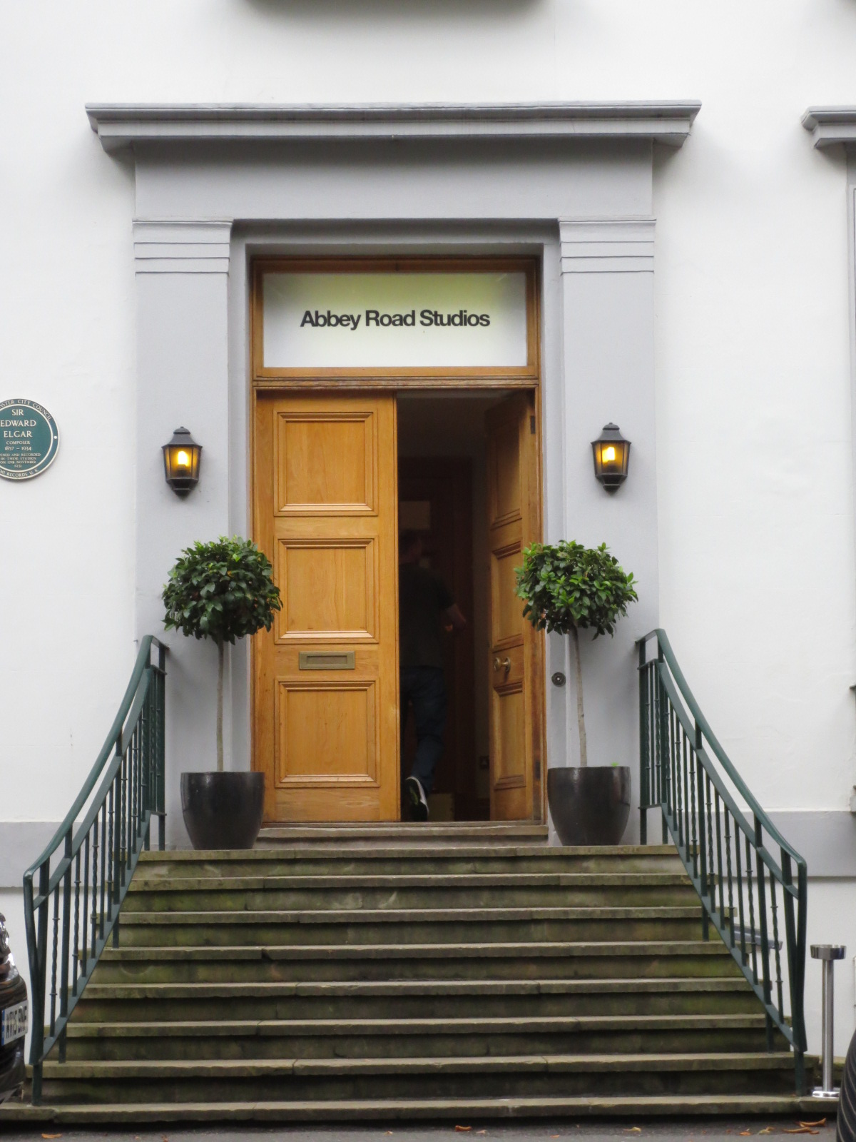 Édifice abritant les studios EMI